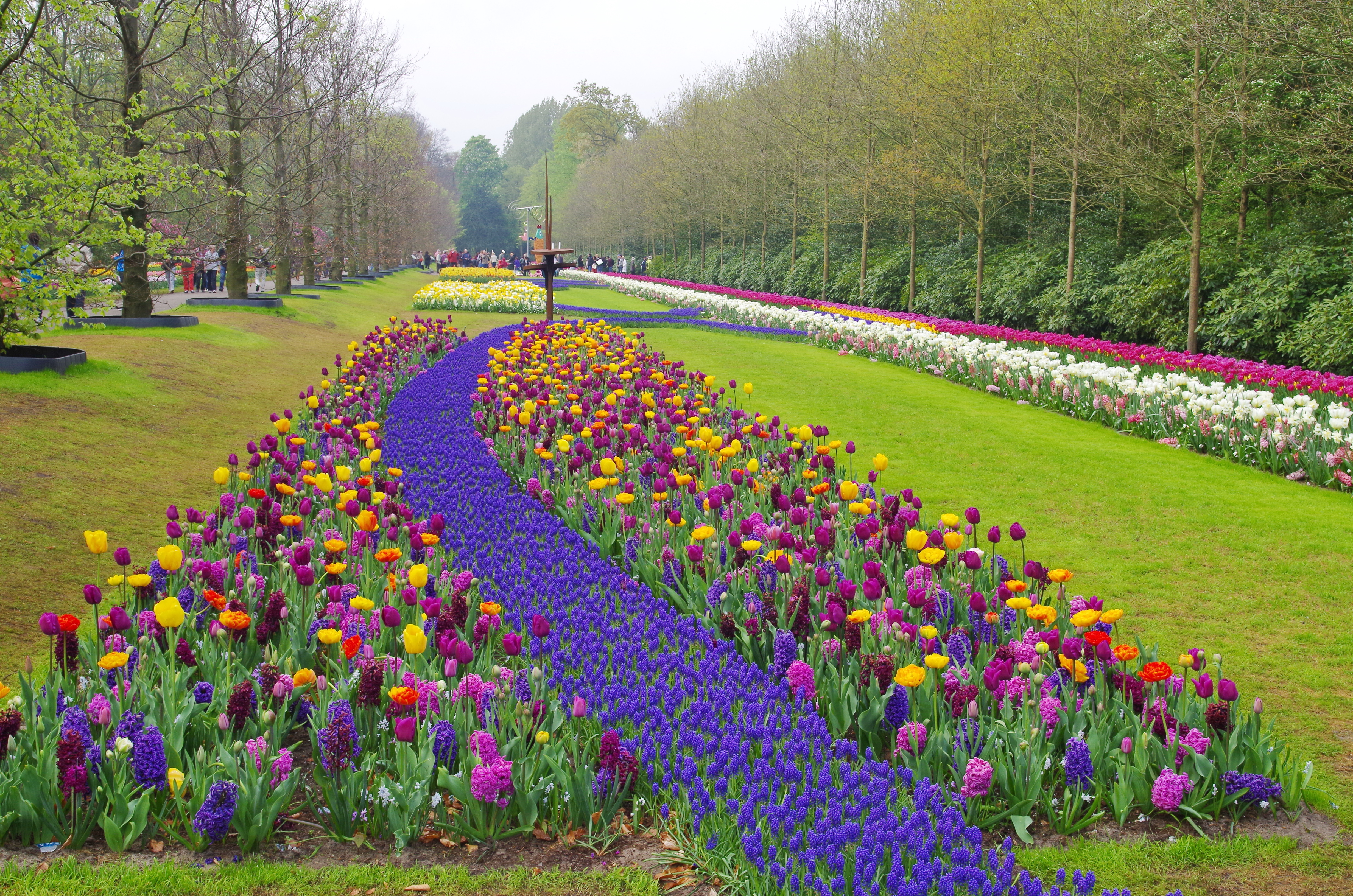 Keukenhof 22.04.2014